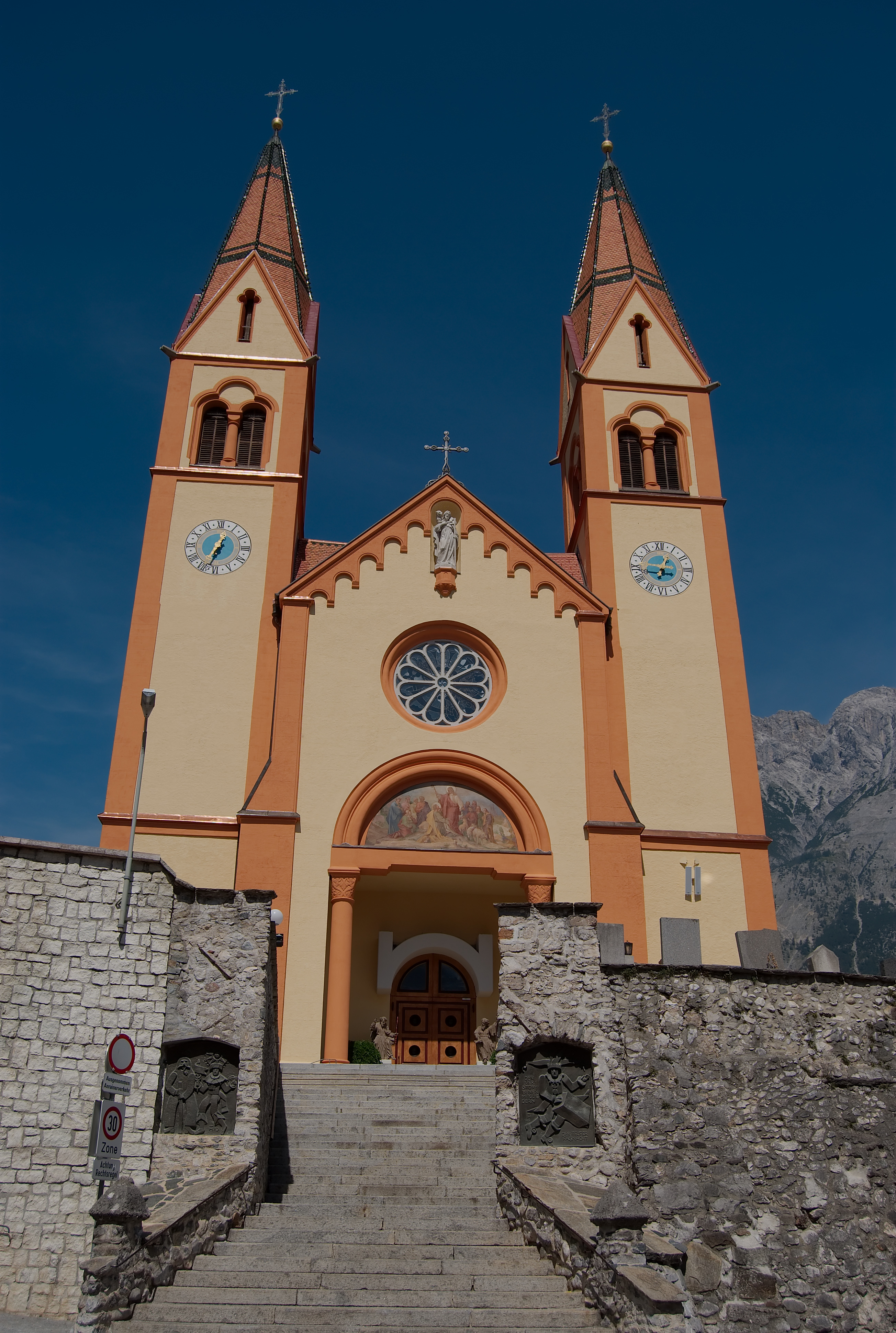 Farní kostel sv. Petra a Pavla v Telfsu